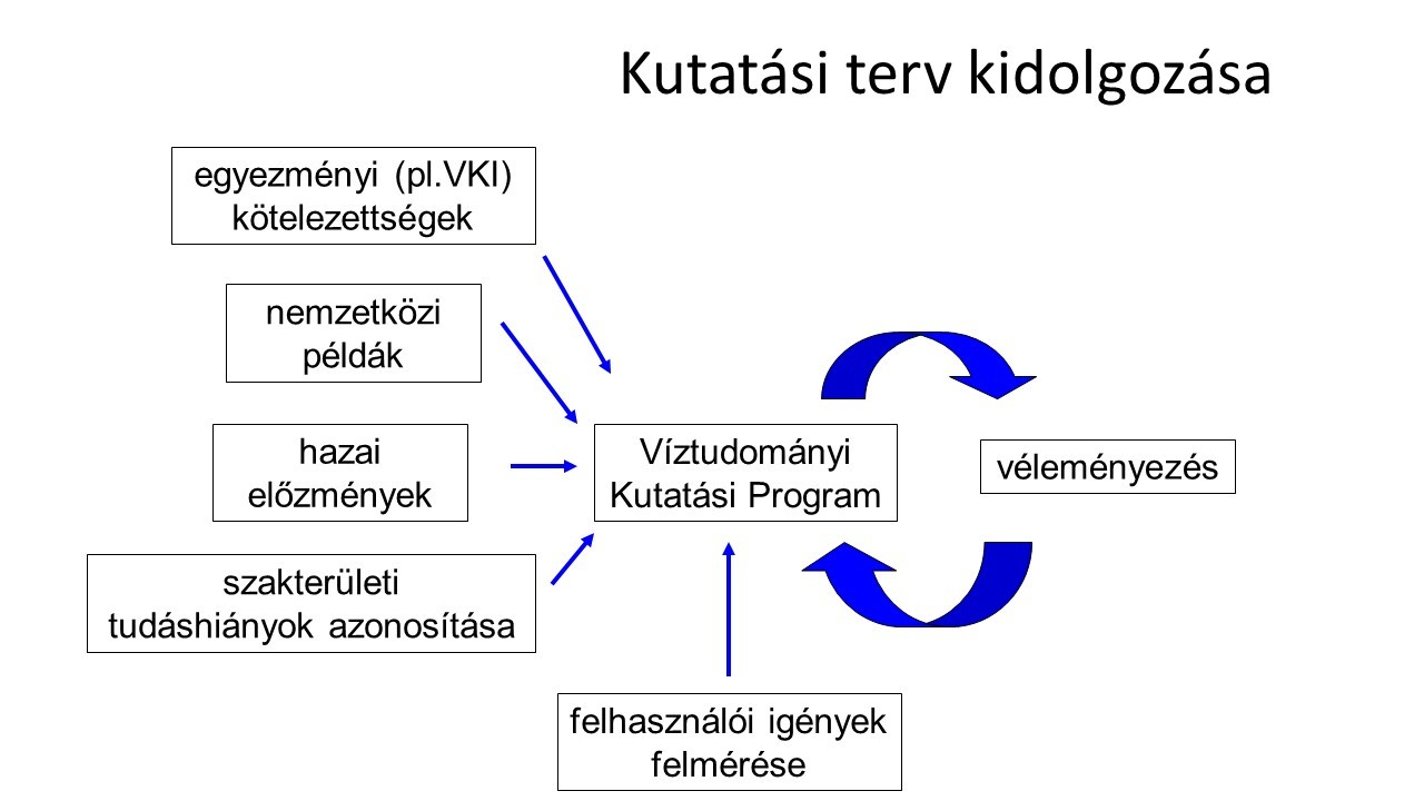 A Nemzeti Víztudományi Program kutatási tervének kidolgozása